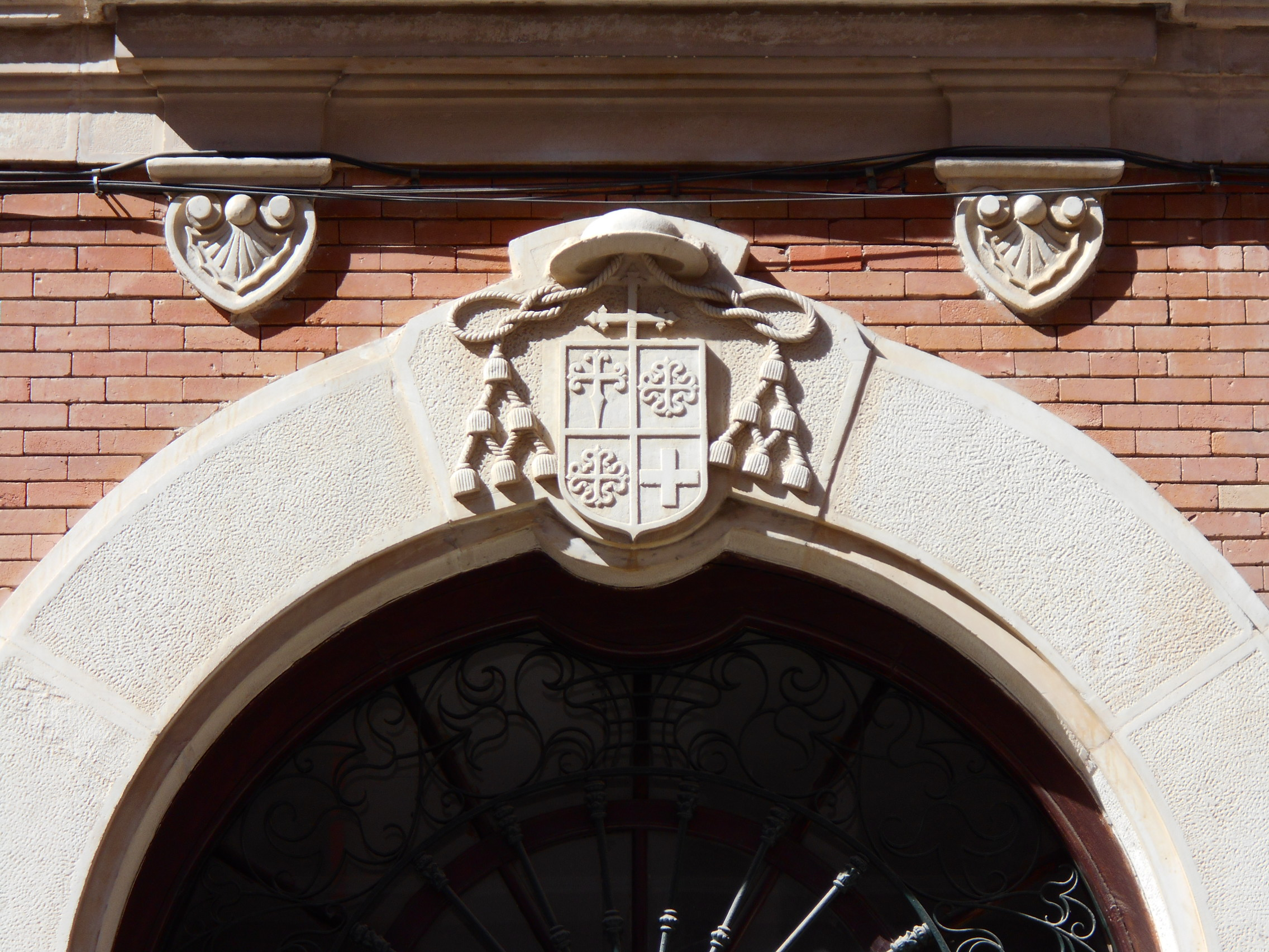 Museo Diocesano